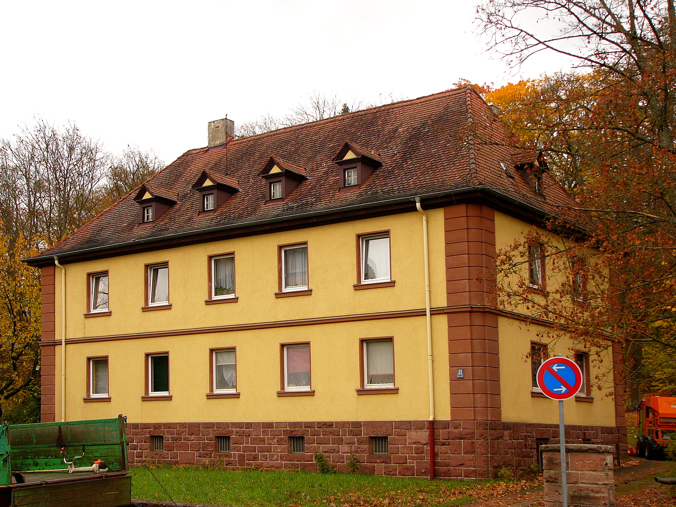 Ehemals Beamtenwohnhaus der deutschen Reichsbahngesellschaft; zweigeschossiger, verputzter Walmdachbau mit Eckquaderung und Hausteinsockel, um 1925. This is a photograph of an architectural monument.